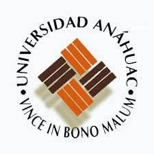 Logo Universidad Anáhuac